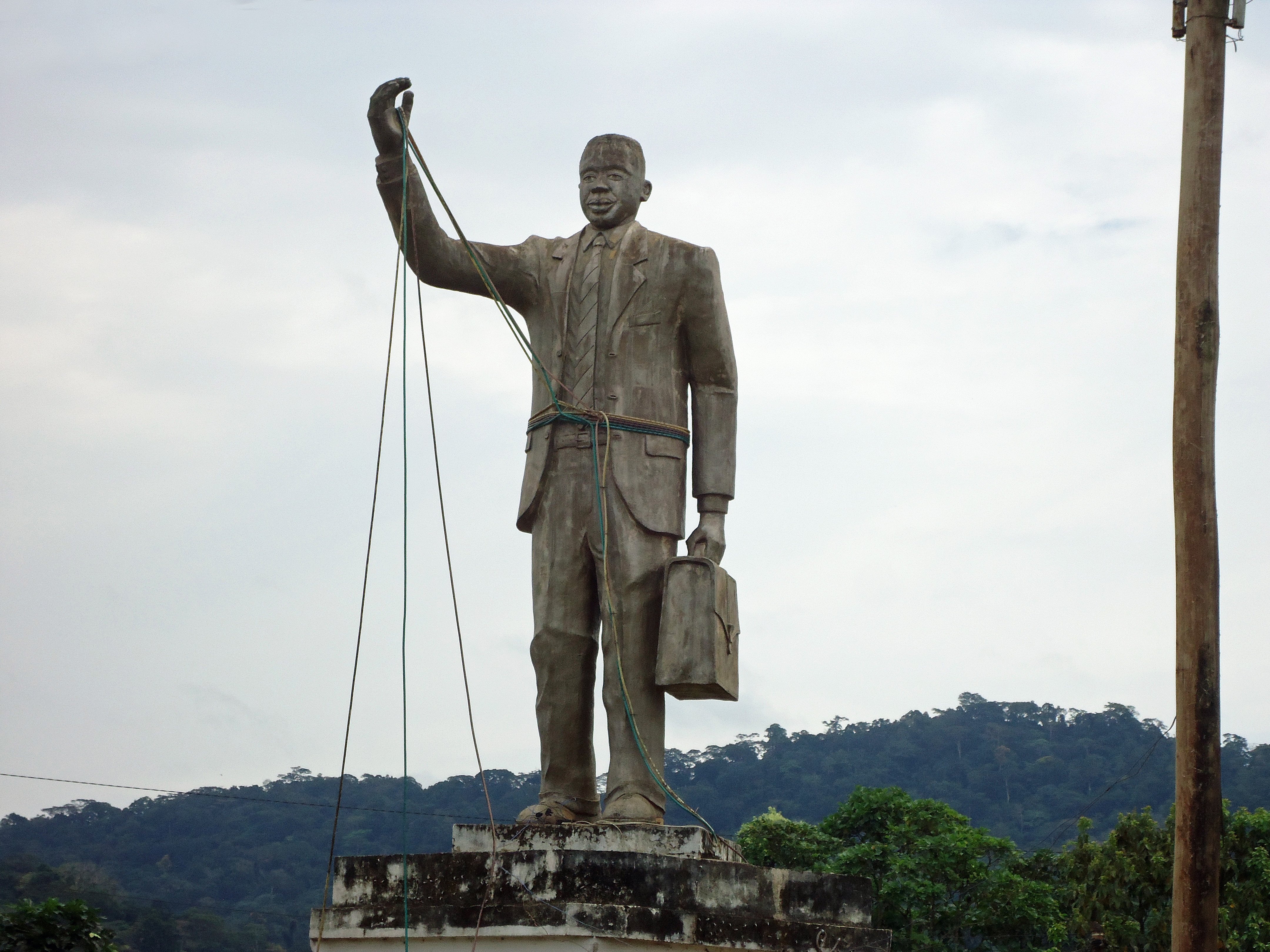 Statuette érigée au coeur de la ville d'Eseka avec l'apport du ministre Frédéric Kodock